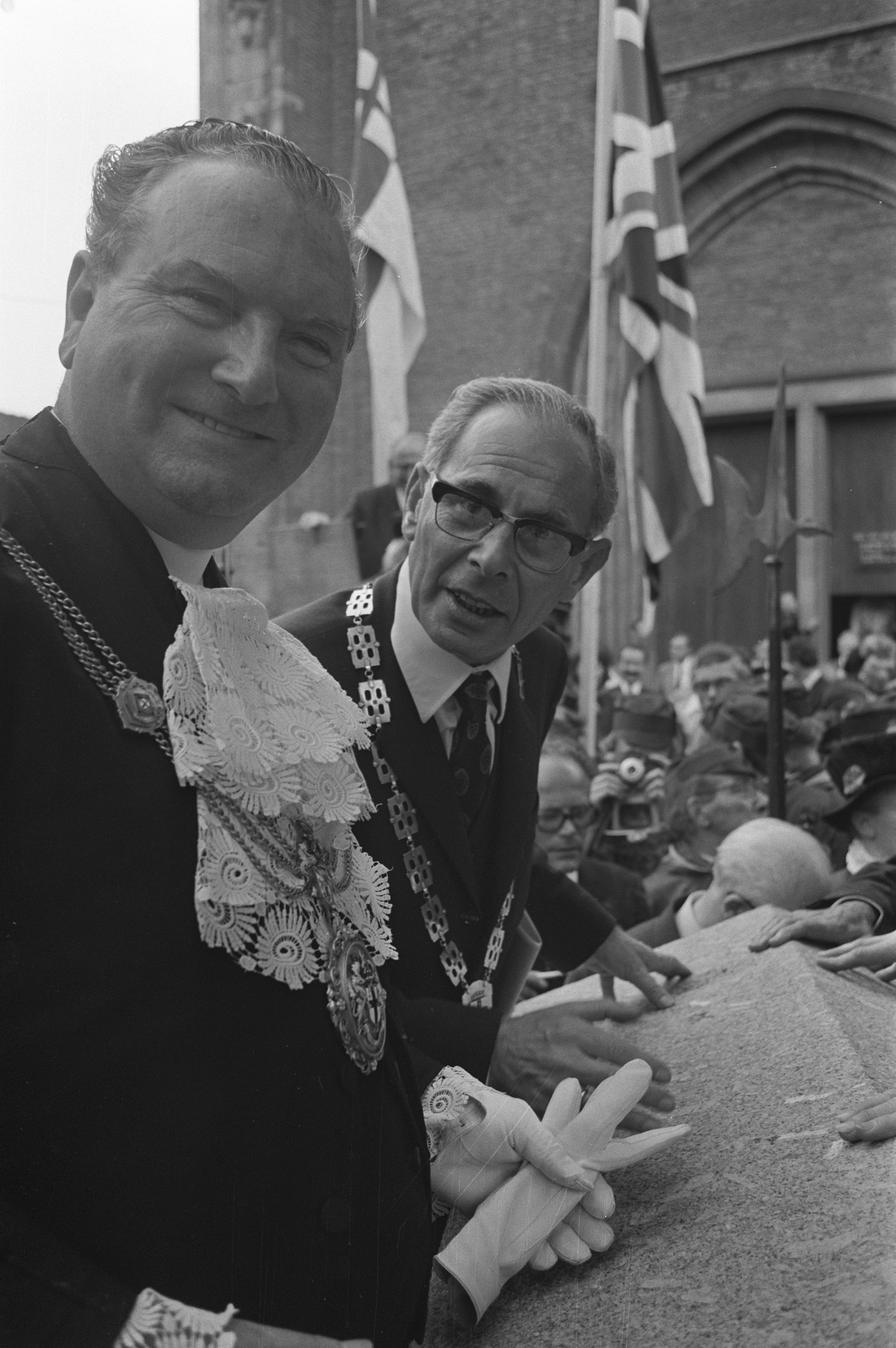 Collectie / Archief : Fotocollectie Anefo Reportage / Serie : [ onbekend ] Beschrijving : Sir James Miller (waarnemend burgemeester Londen) en burgemeester Troostwijk van Amersfoort Beestenmarkt, Amersfoort Datum : 21 augustus 1971 Locatie : Amersfoort Trefwoorden : burgemeesters, markten Persoonsnaam : Miller, James, Troostwijk Fotograaf : Peters, Hans / Anefo Auteursrechthebbende : Nationaal Archief Materiaalsoort : Negatief (zwart/wit) Nummer archiefinventaris : bekijk toegang 2.24.01.05 Bestanddeelnummer : 924-8404